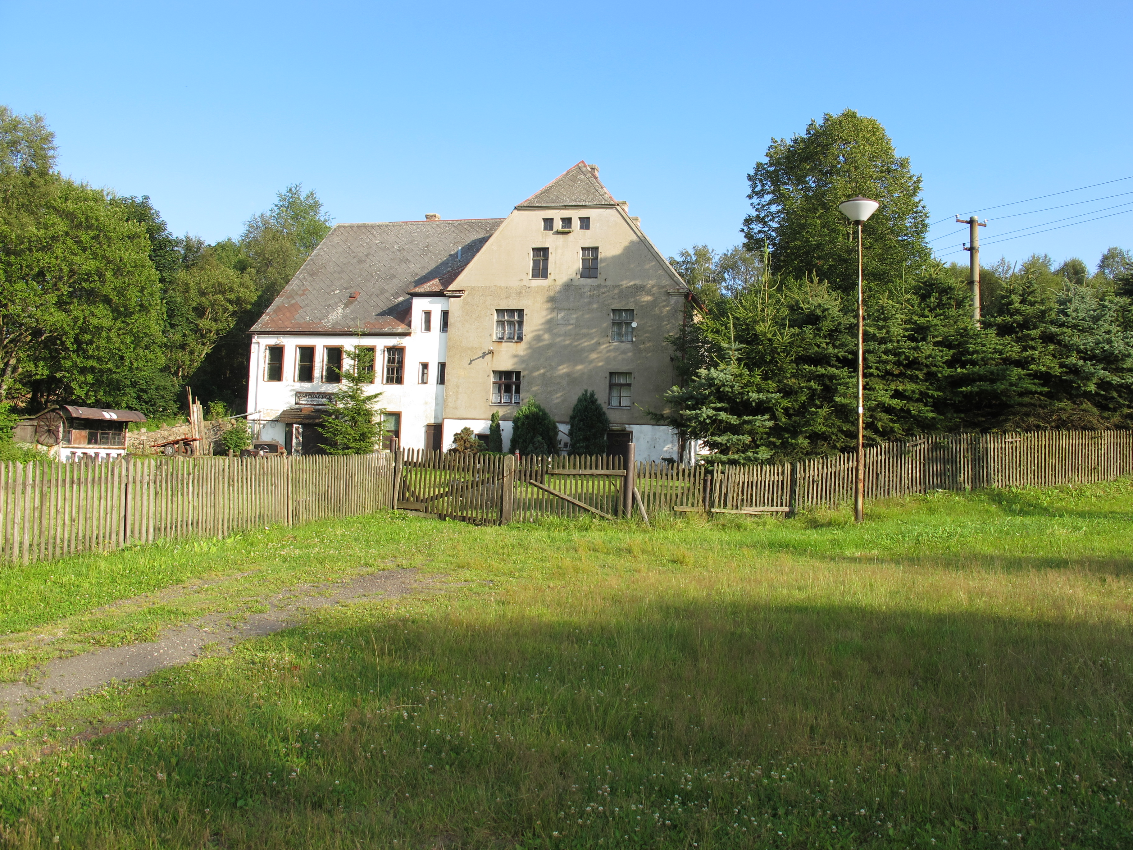 Samota Pachenkov u Hory Sv. Kateřiny